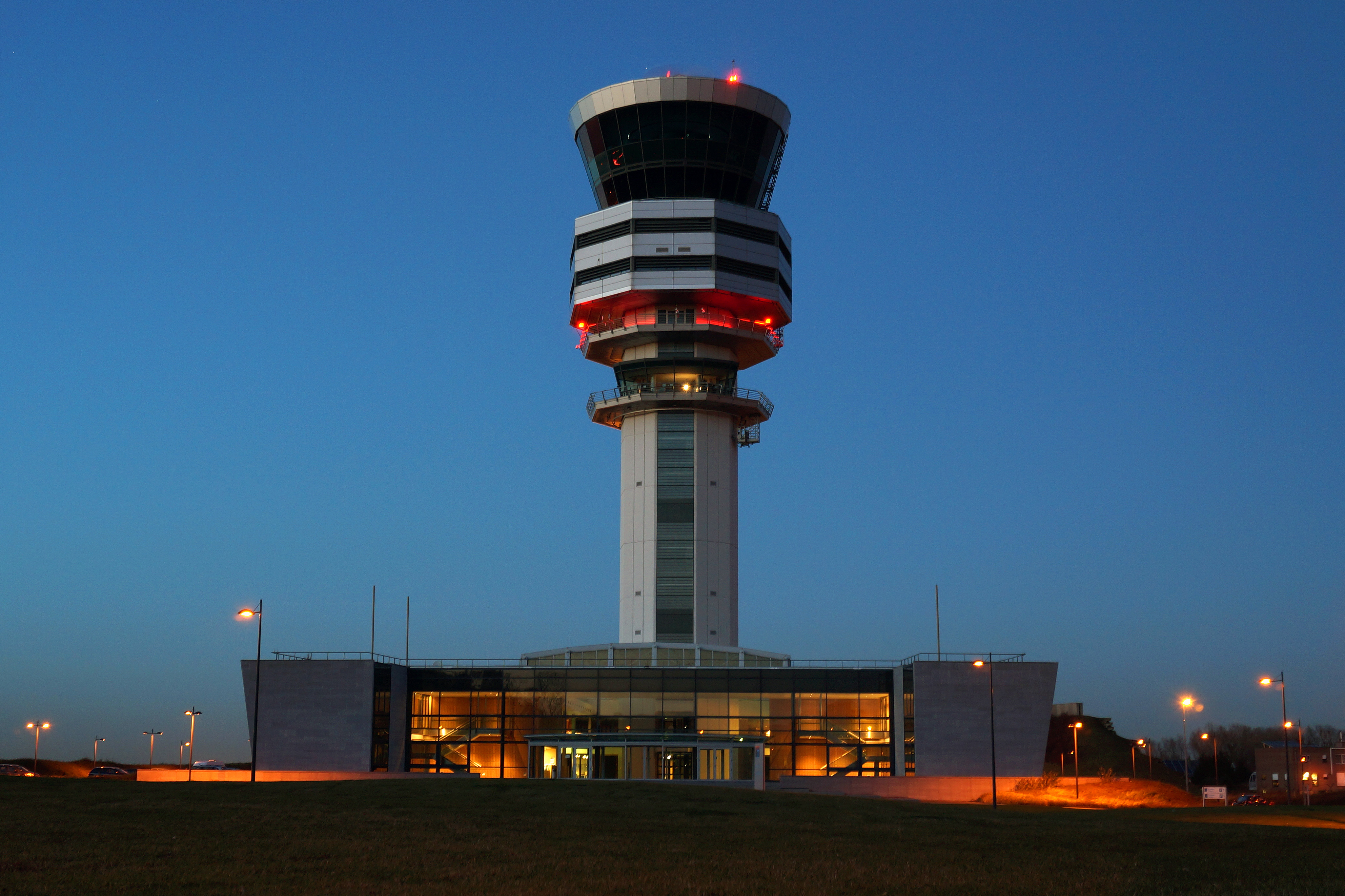 Verkeerstoren Brussels Airport